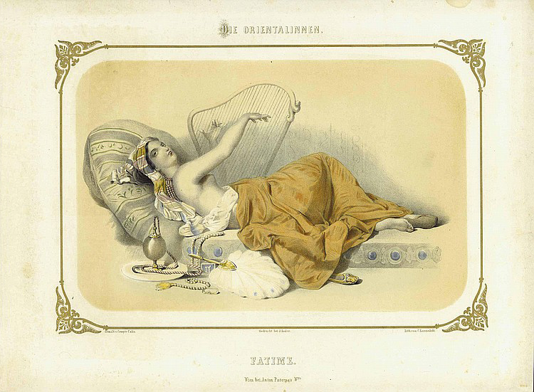 Fatime